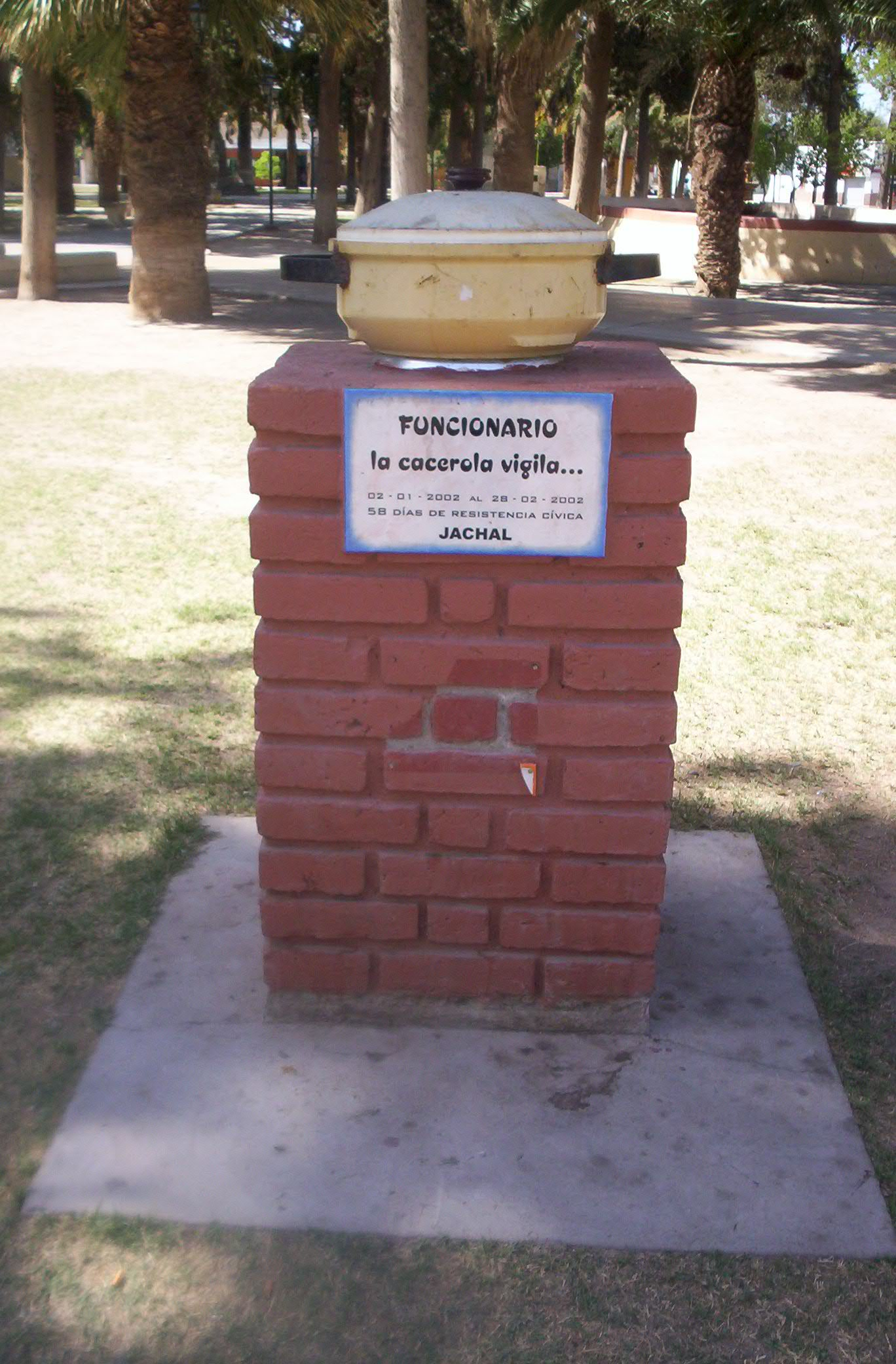 Vista del monumento a la cacerola, ubicado en la plaza principal de la ciudad argentina de San José de Jáchal, provincia de San Juan